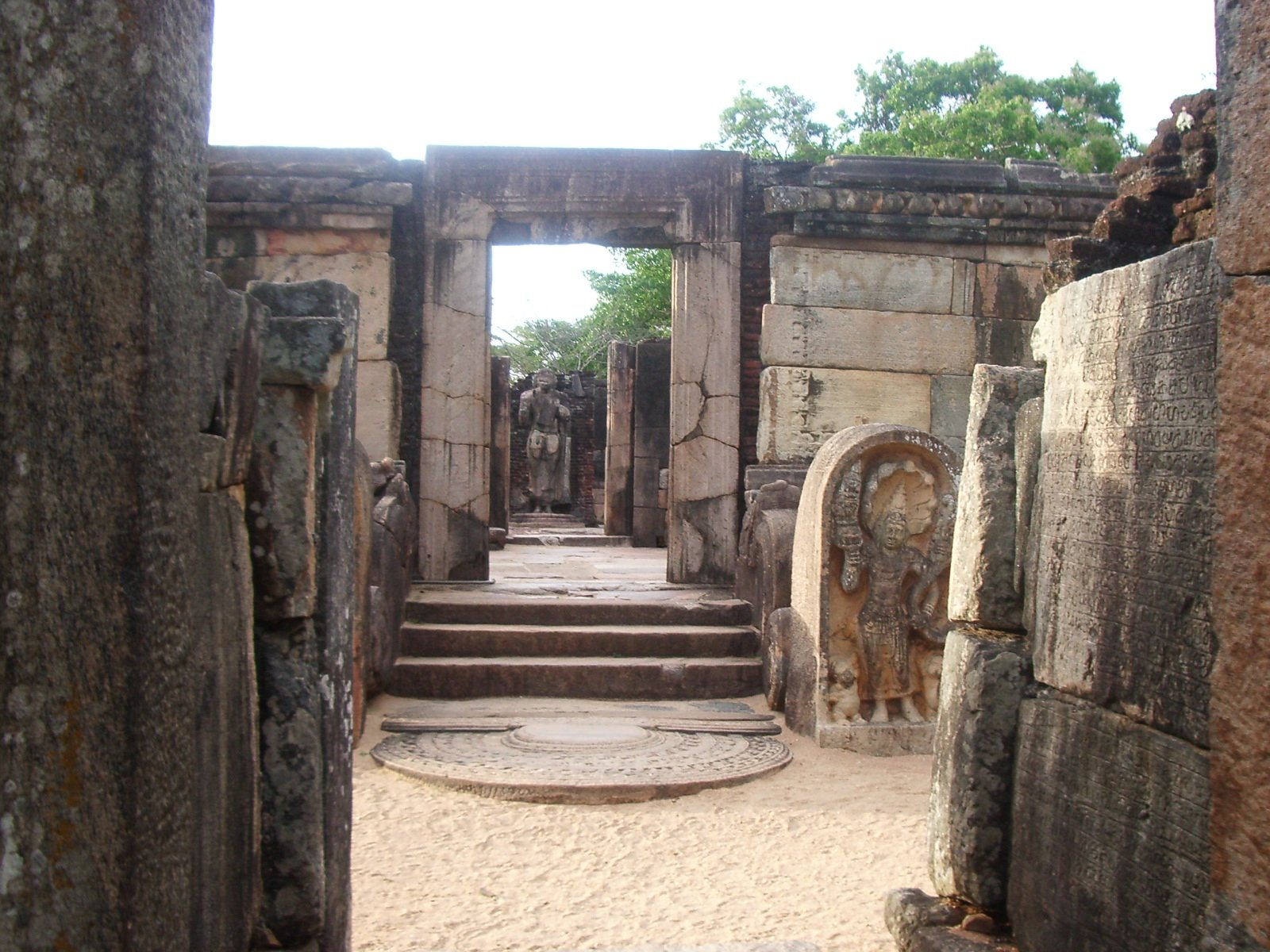 Temple a Polonnaruwa; foto feta per J. Ollé el juliol del 2006